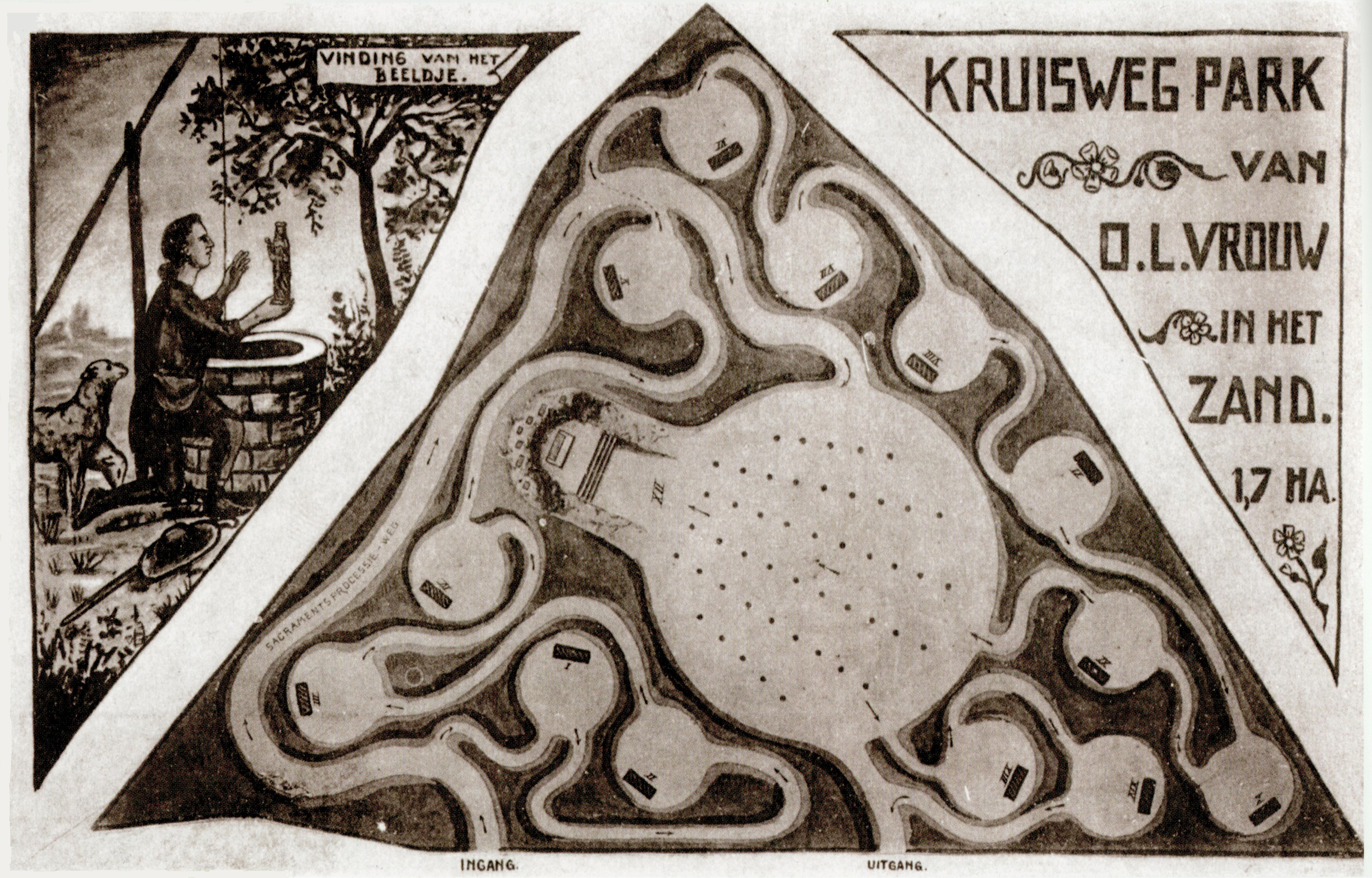 Kruiswegpark, Roermond. Prentbriefkaart. Roermond, Gemeentearchief.